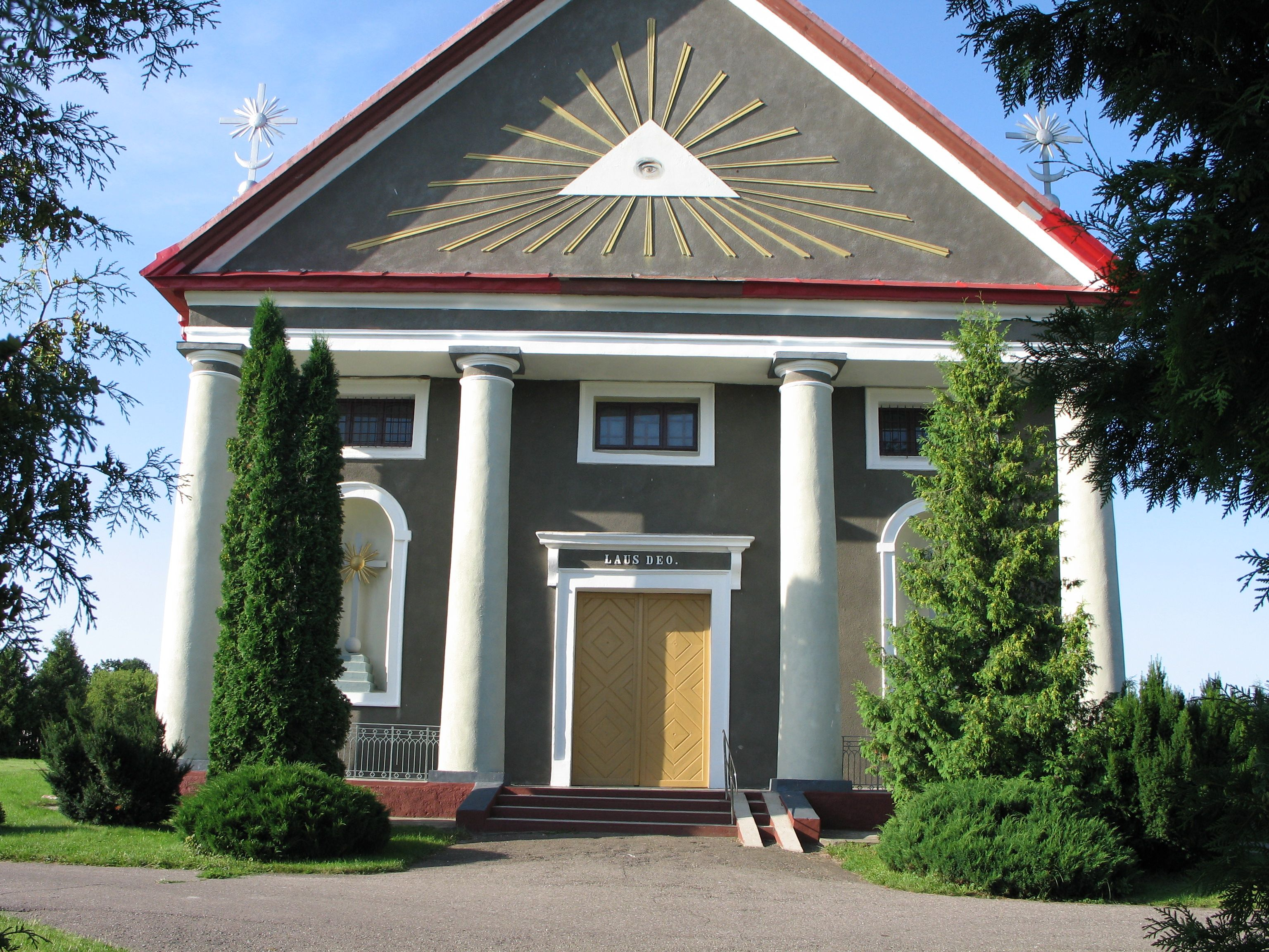 Kościół w Wielkich Ejsymontach